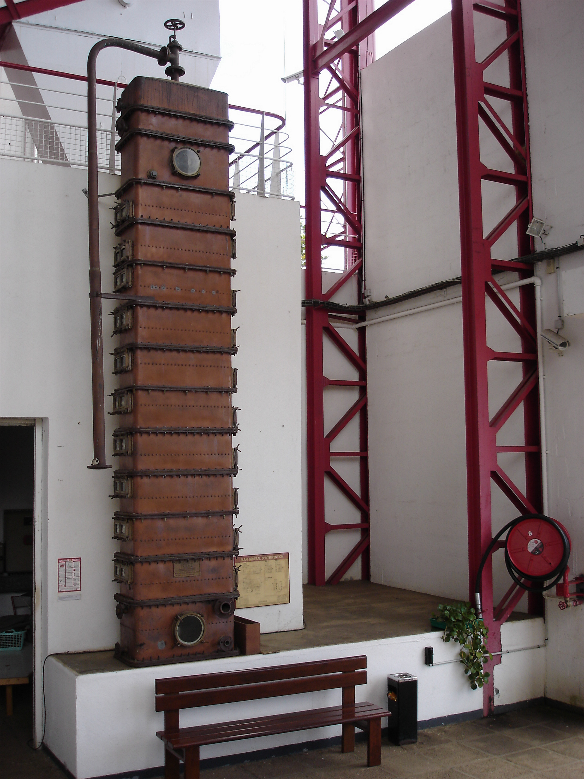 Description: Une colonne à distiller dans le musée Stella Matutina, novembre 2004, La Réunion Source:Bouba